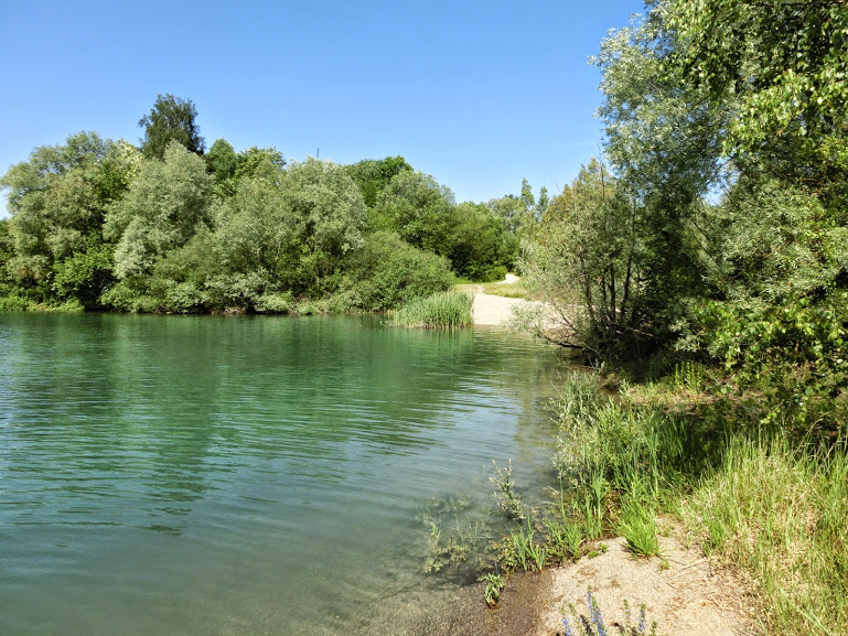 Deutschland - Baden-Württemberg - Landkreis Sigmaringen - Pfullendorf: See im "Seepark Linzgau"